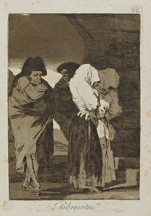 Capricho nº 22: ¡Pobrecitas! de Goya, serie Los Caprichos